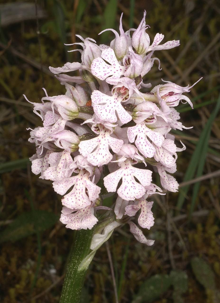 Neotinea tridentata subsp. conica